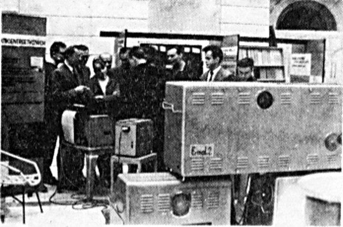 EMAL-2